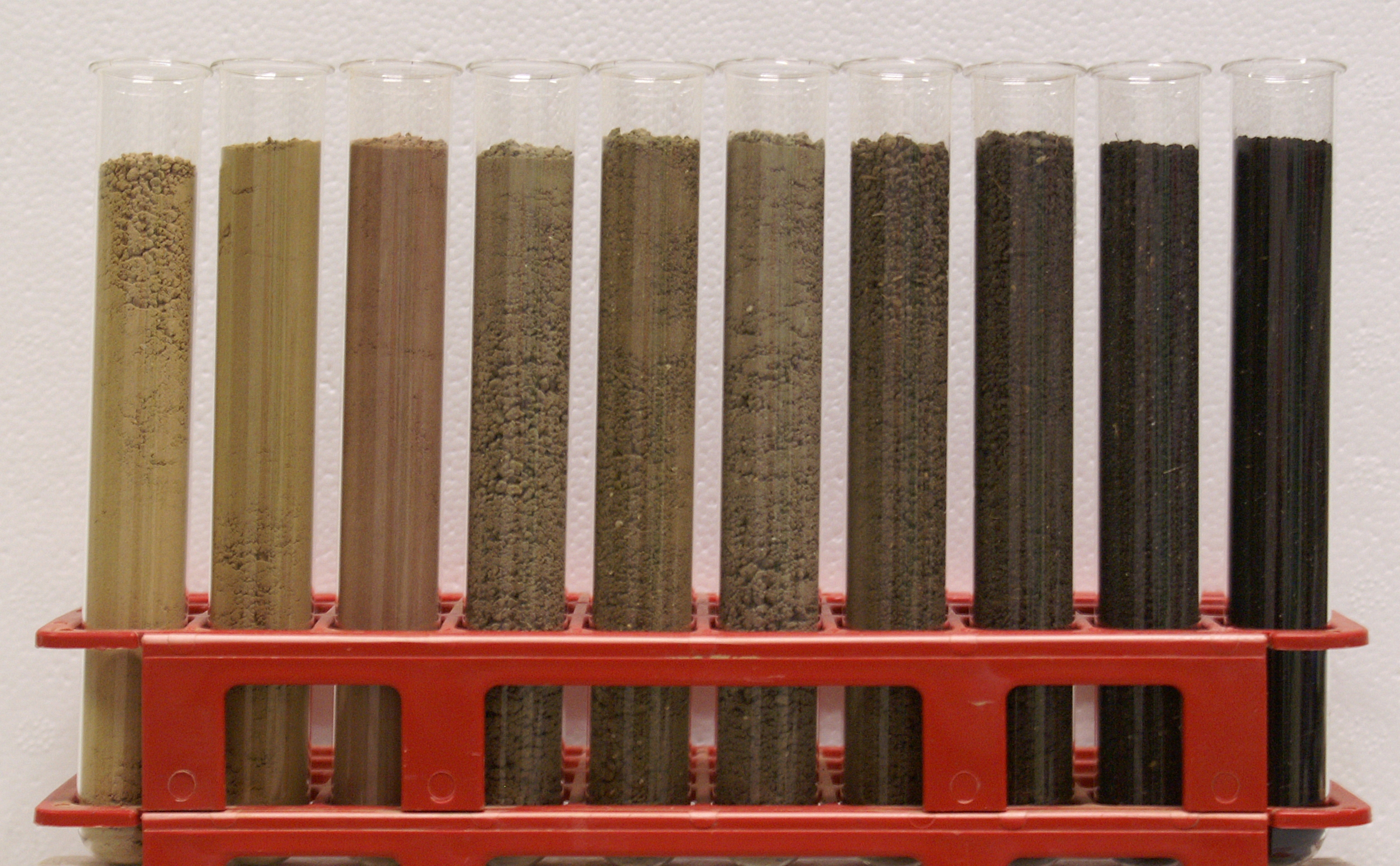 Bodenproben mit unterschiedlichen Humusgehalten